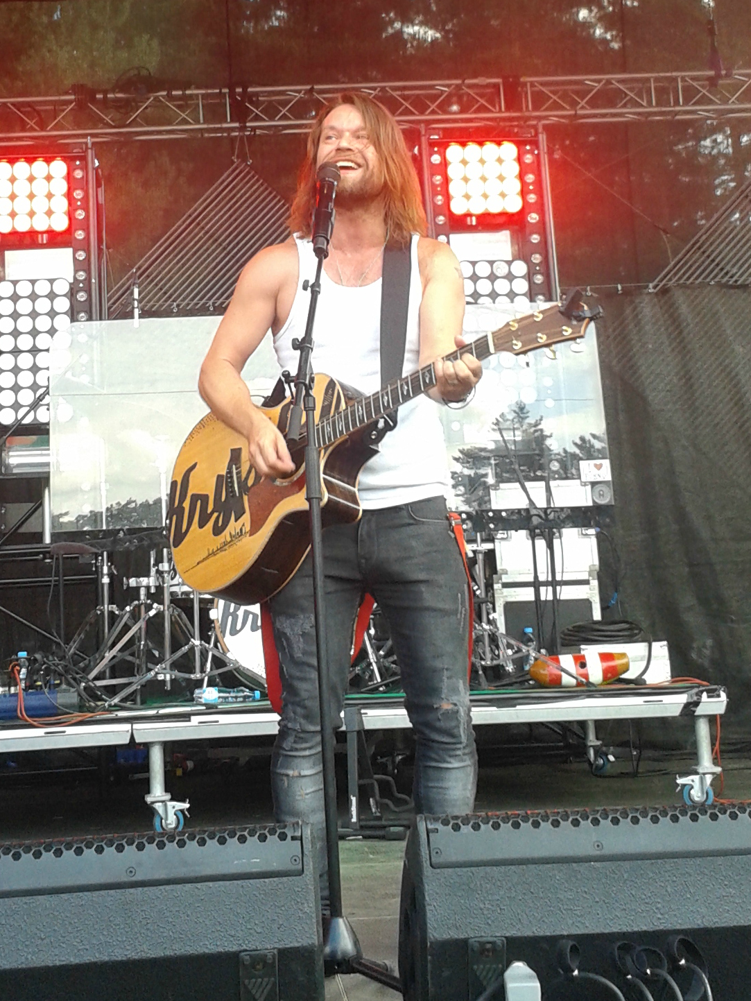 Richard Krajčo na festivalu v roce 2013